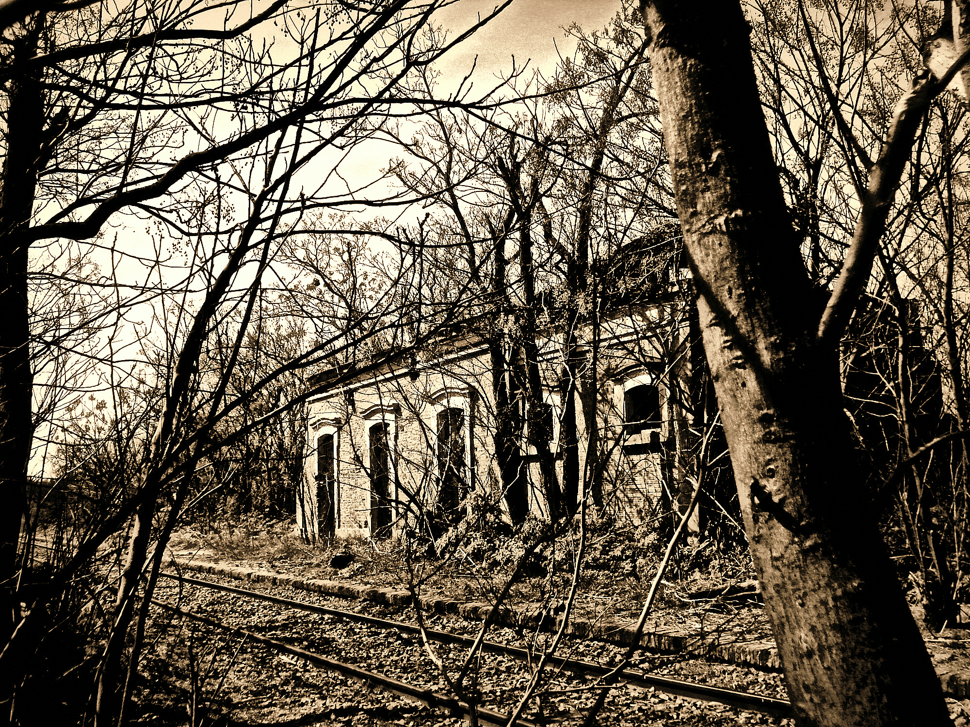 Estación de FC abandonada, como tantas en nuestro País.